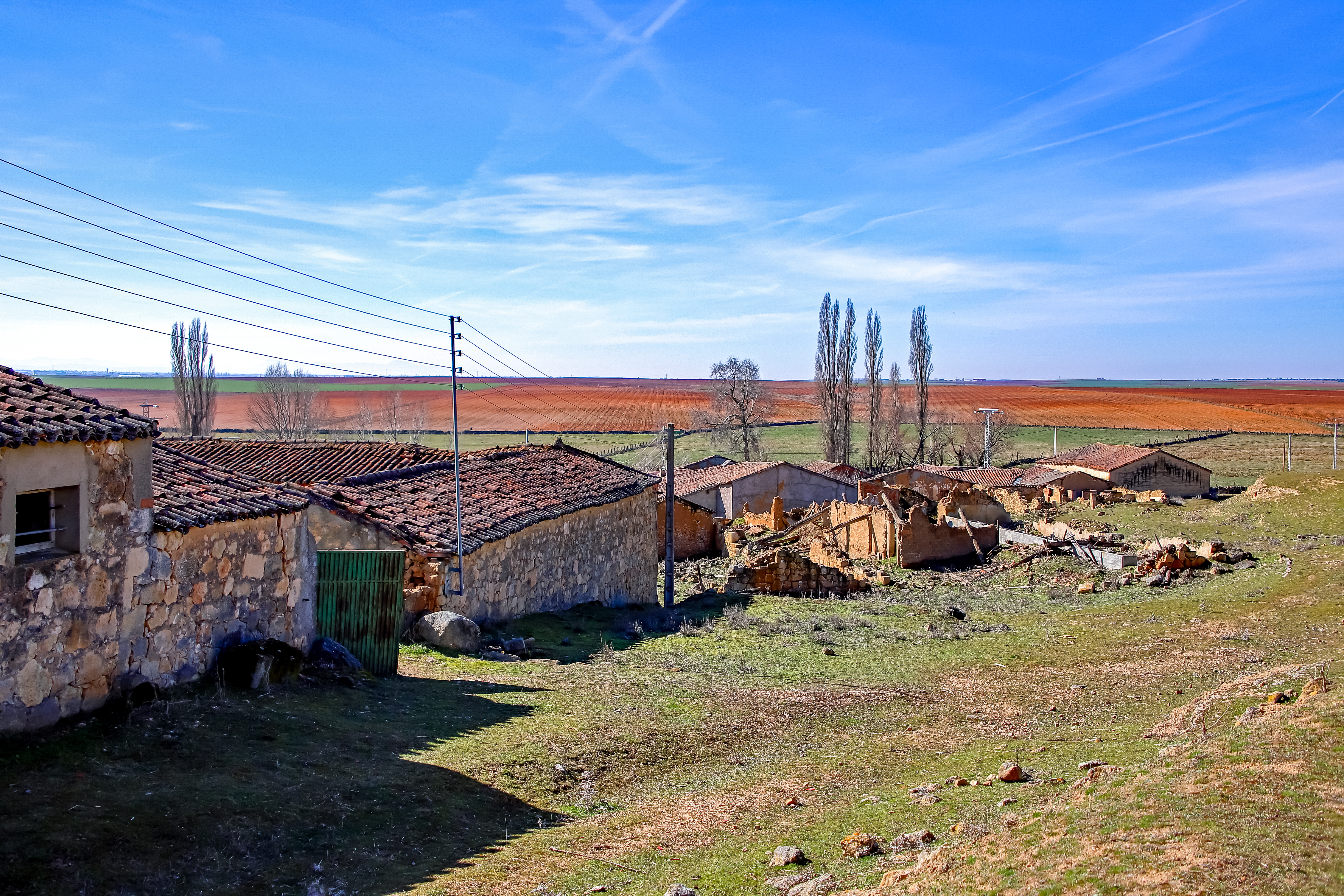 Santo Tomé de Colledo es un despoblado que pertenece al municipio de Galindo y Perahuy, comarca Campo de Salamanca, provincia de Salamanca.